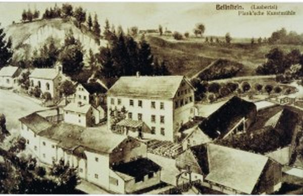 Hammermühle Beilnstein um 1900 (Plank'sche Kunstmühle)